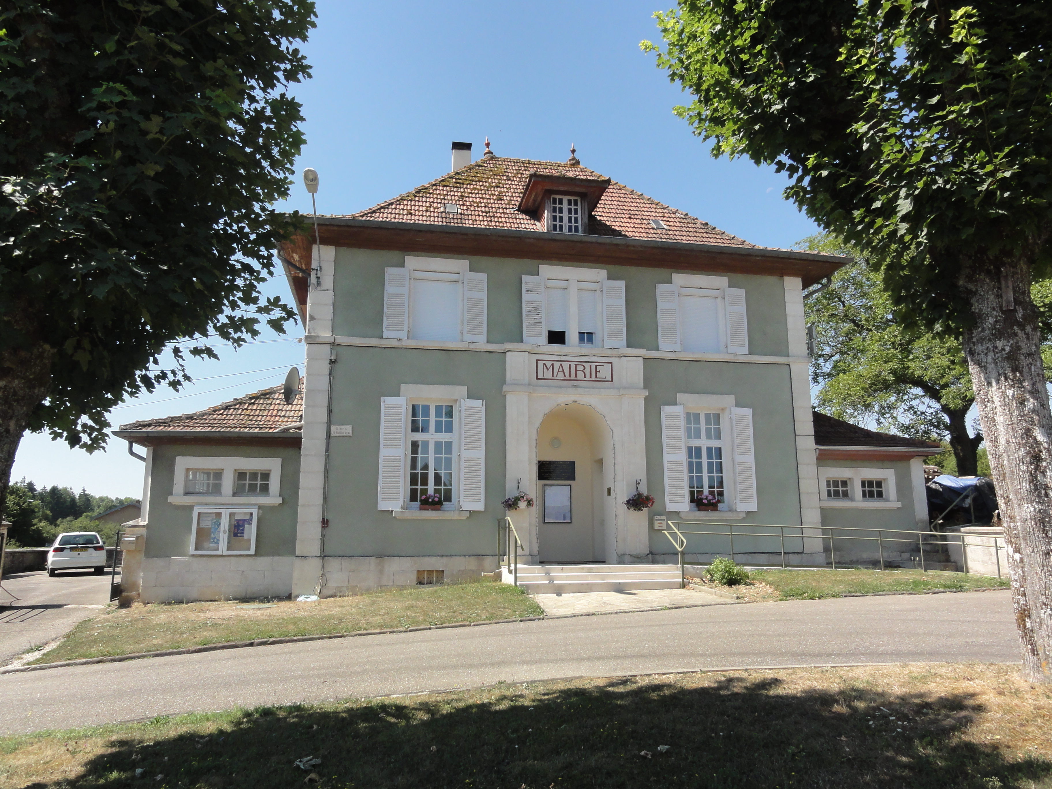 Béthincourt (Meuse) mairie